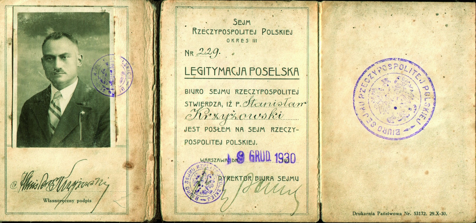 Legitymacja poselska Stanisława Krzyżowskiego, członka władz naczelnych PSChD w Warszawie